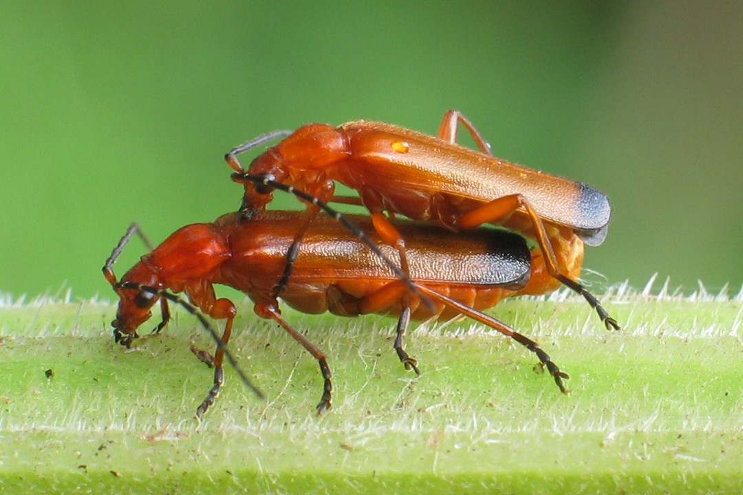 Rote Weichkäfer (Rhagonycha fulva)